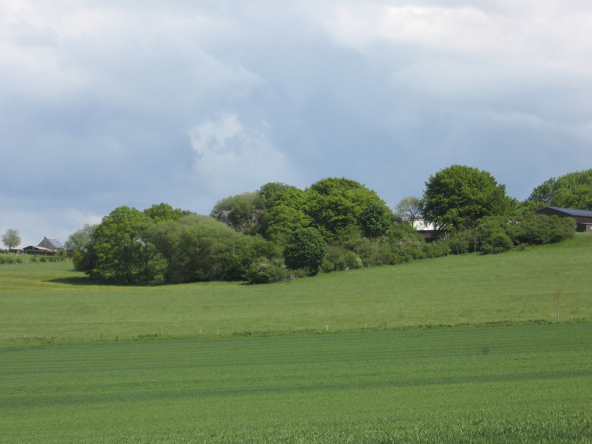 Bereich Kleiner Blumenstein im NSG Blumenstein mit Magerrasen im Hintergrund, davor Landschaftsschutzgebiet Grünlandverbund Aa.